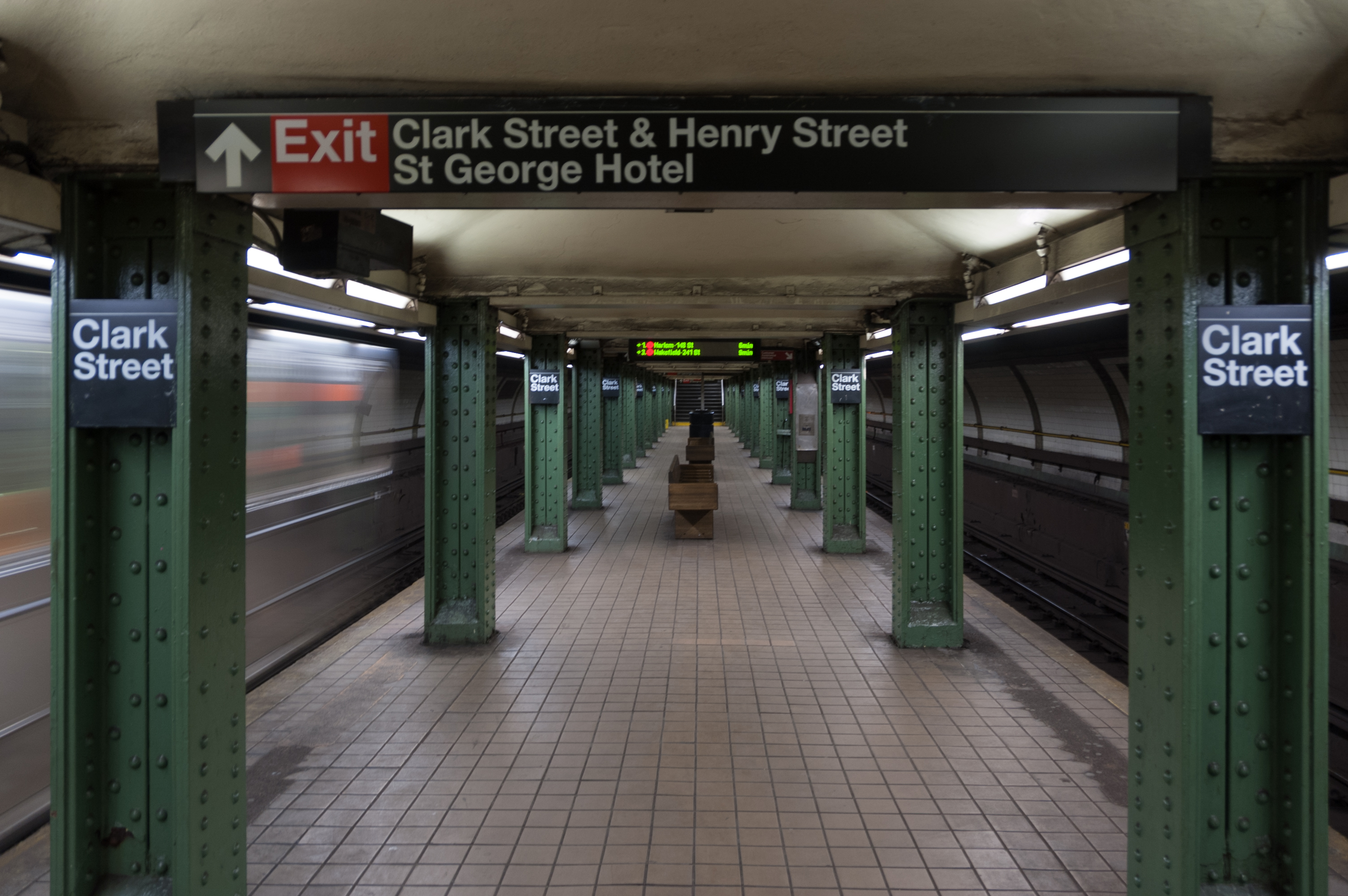 Stacja metra.